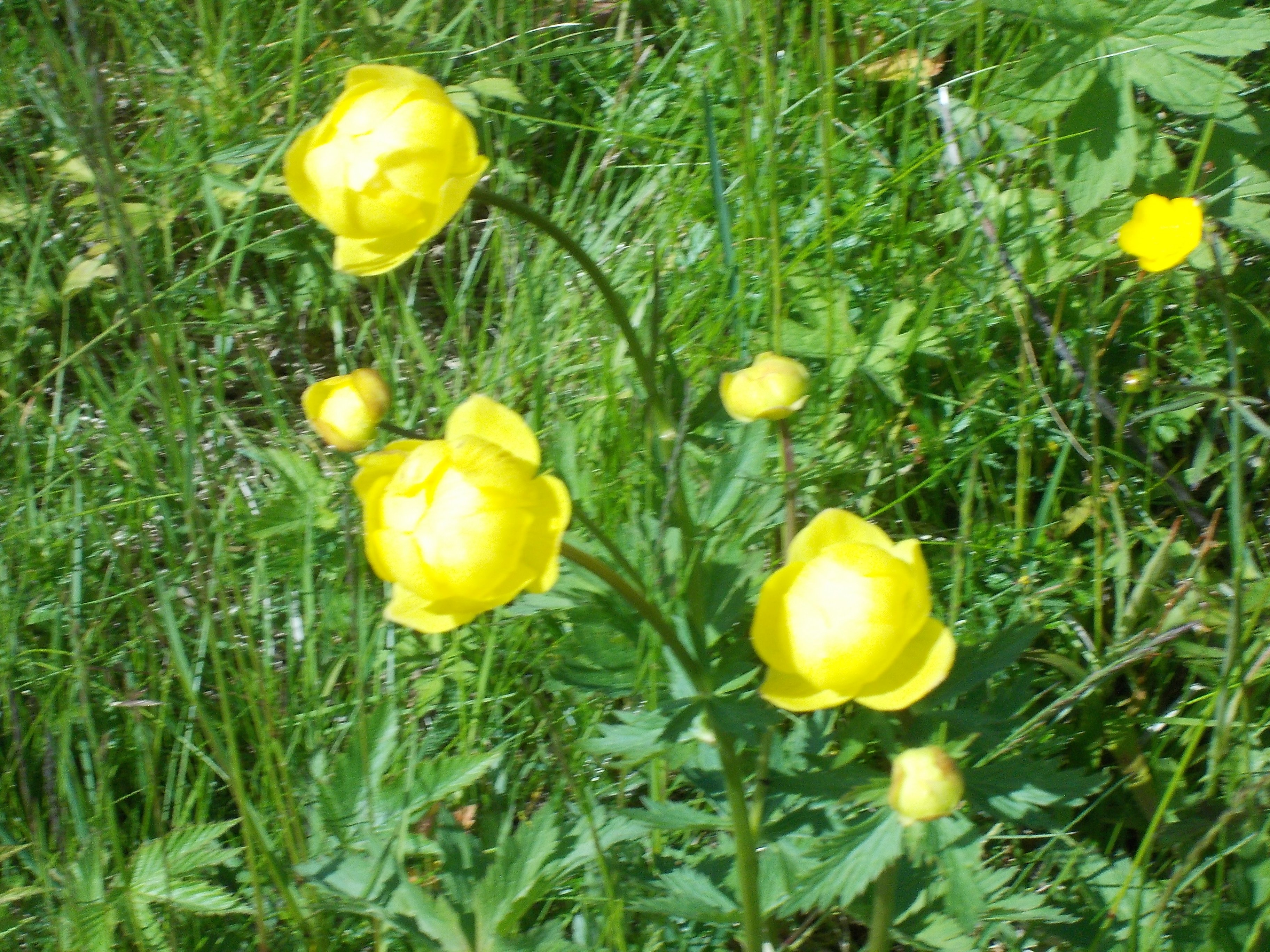 Smörboll växer rikligt i Älvhytteängen på försommaren.